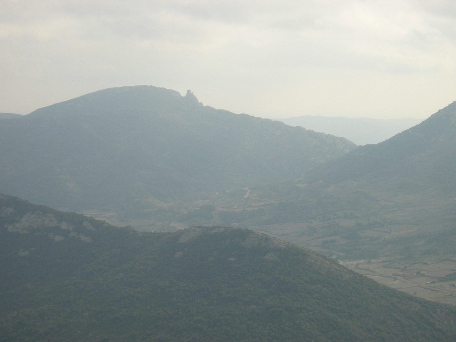 Las Corbièras vistas del castèl de Pèirapertusa amb lo castèl de Querbús al luènh.Fait per ieu scArf